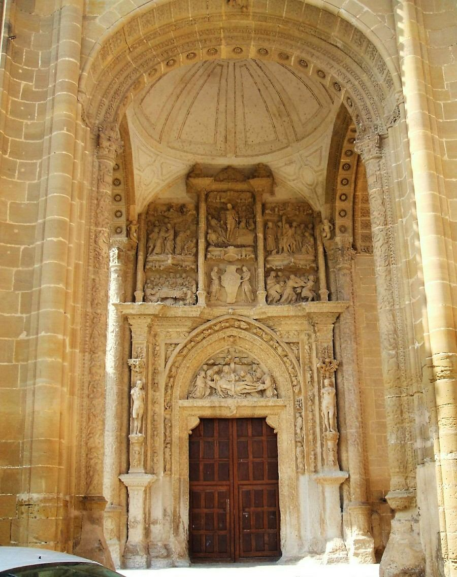 Portada plateresca (s-XVI) del Monasterio de monjas dominicas de Nuestra Señora de la Piedad, en Casalarreina, La Rioja, España/Spain